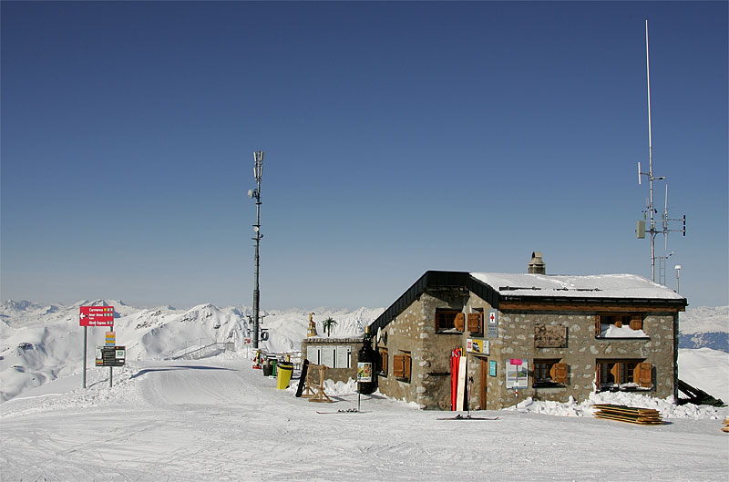 Auf dem Weisshorn ob Arosa, Hütte inzwischen abgebrochen